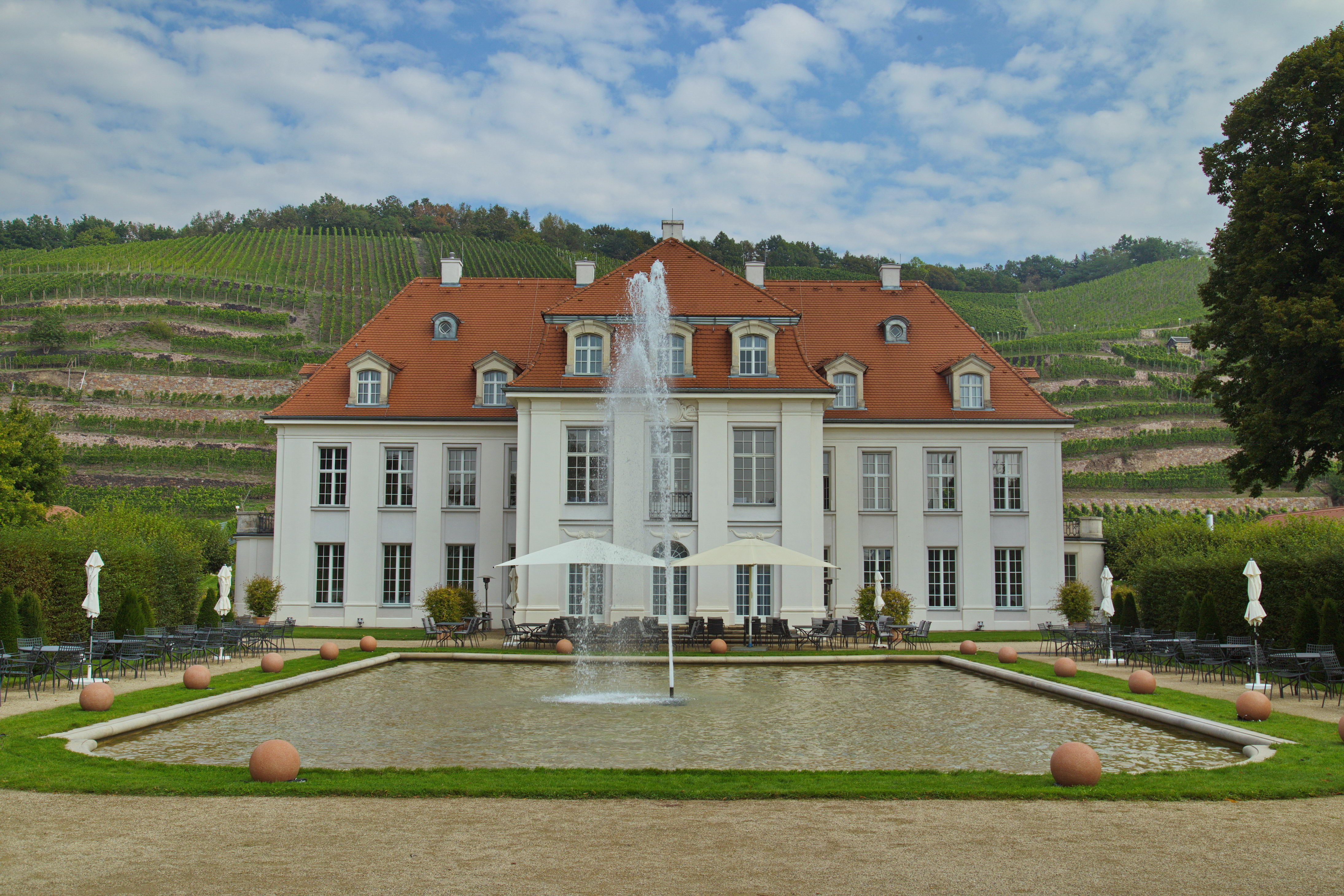 Radebeul, Schloss Wackerbarth, Wackerbarthstraße 1